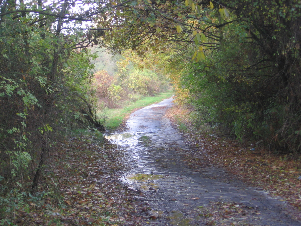 ulica Bierdzańska we Wrocławiu, widok z Nizinnej